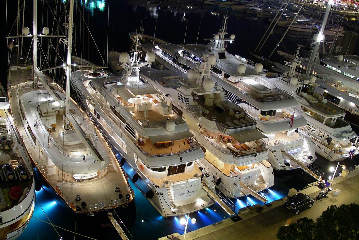 Hafen von Monaco